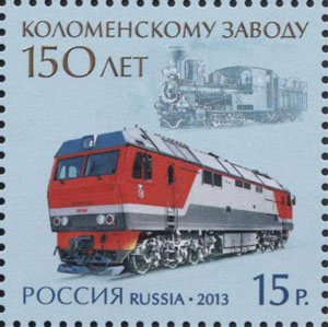 150 лет Коломенскому заводу